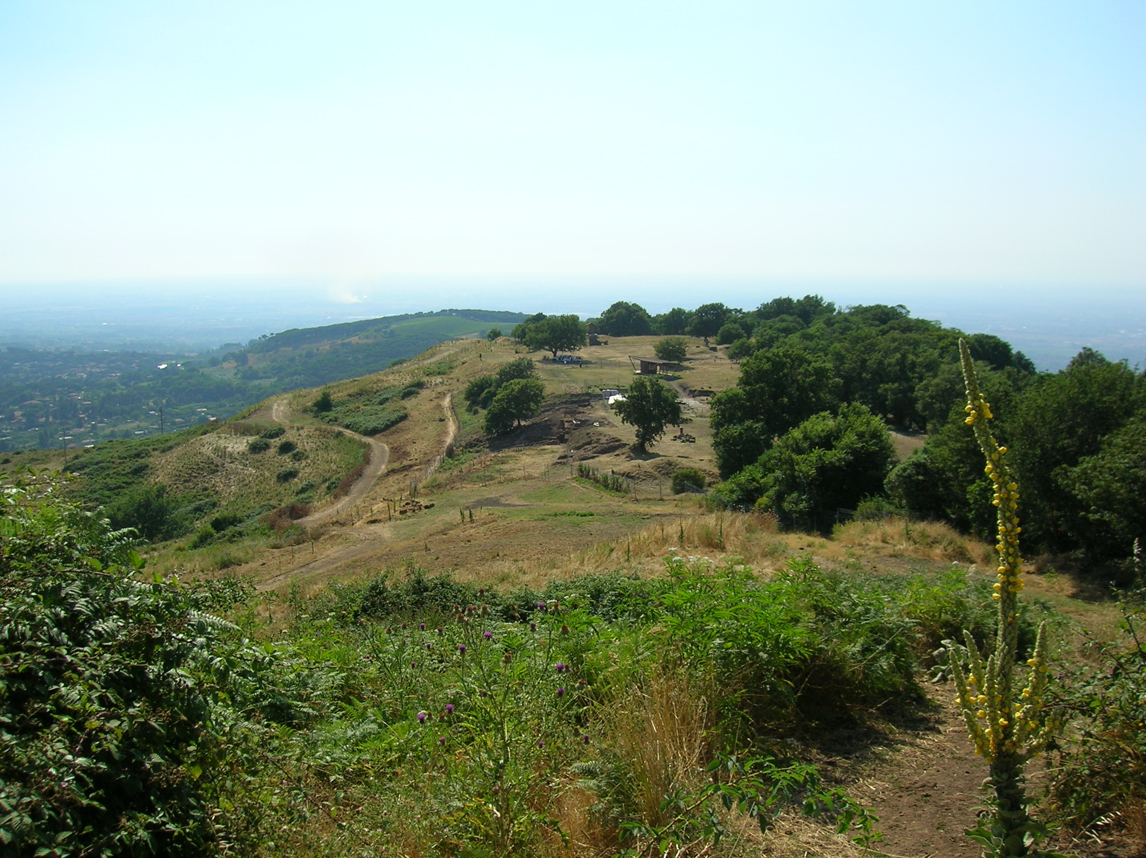 Parte del Parco archeologico visto dalla sommità del monte. Parco archeologico del Tusculum, Lazio, Italia.